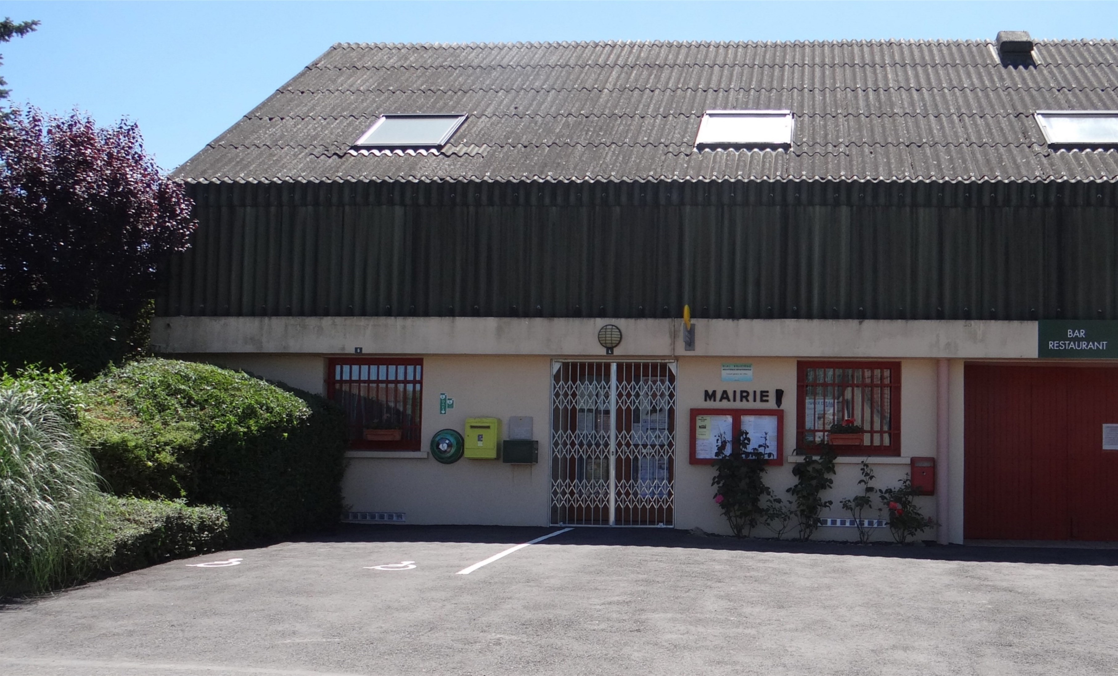 Mairie de Le Pin, Allier, France.